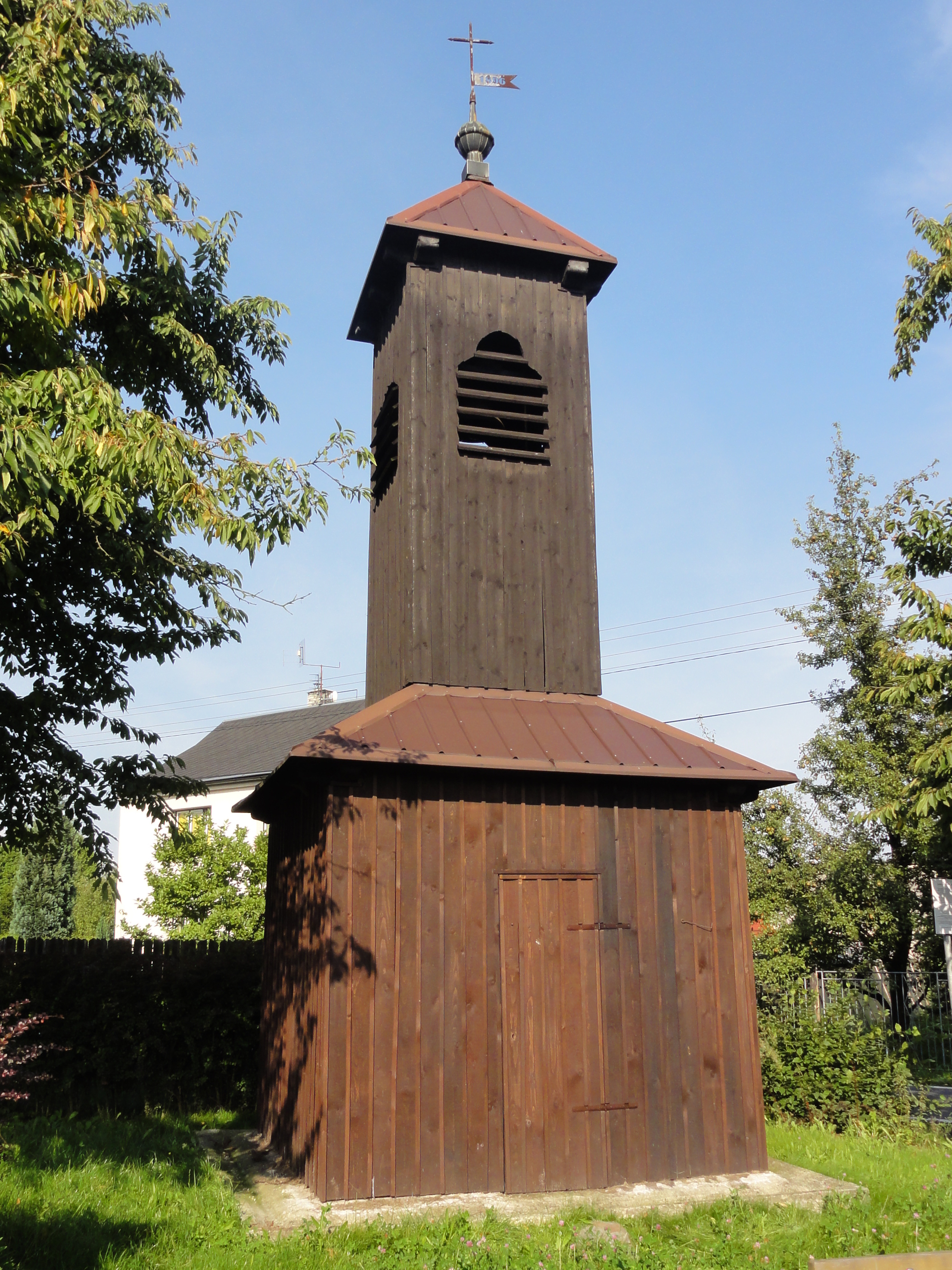 Dzwonnica w Datyniach Dolnych, z 1896